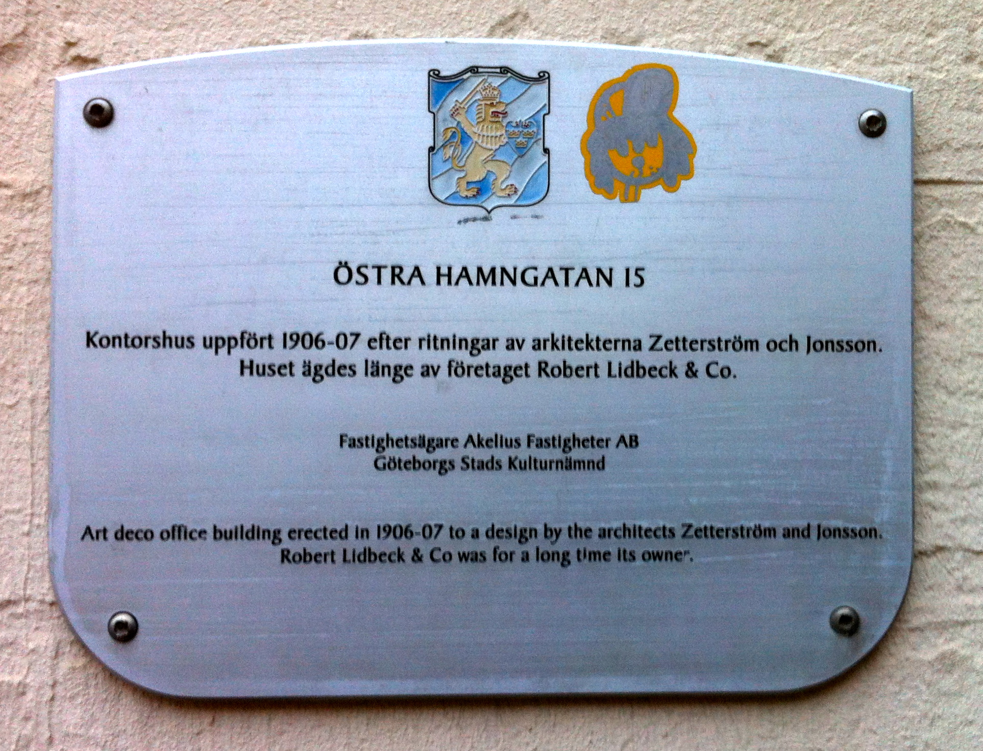 Plakett, Östra Hamngatan 15 i Göteborg. Plaketten sattes upp som en del av Göteborgs stads kulturnämnds "Projekt Husmärkning" kring åren 2000-2001 där drygt etthundra skyltar ingick. Se även boken "100 utmärkta hus i Göteborg". Vid en inventering av kommunen gjord 2016 satt 69 skyltar fortfarande uppe.